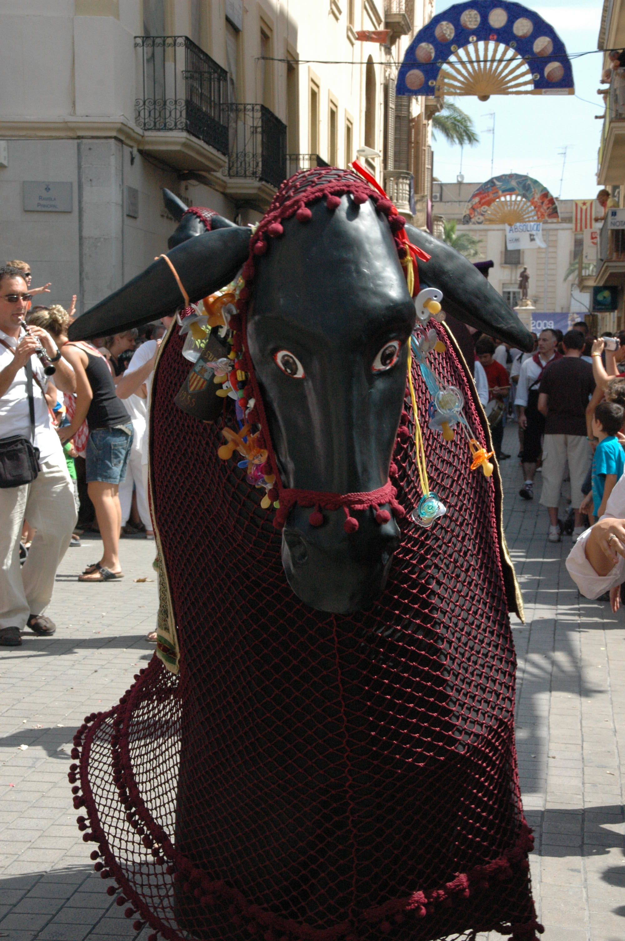 Festa major Vilanova